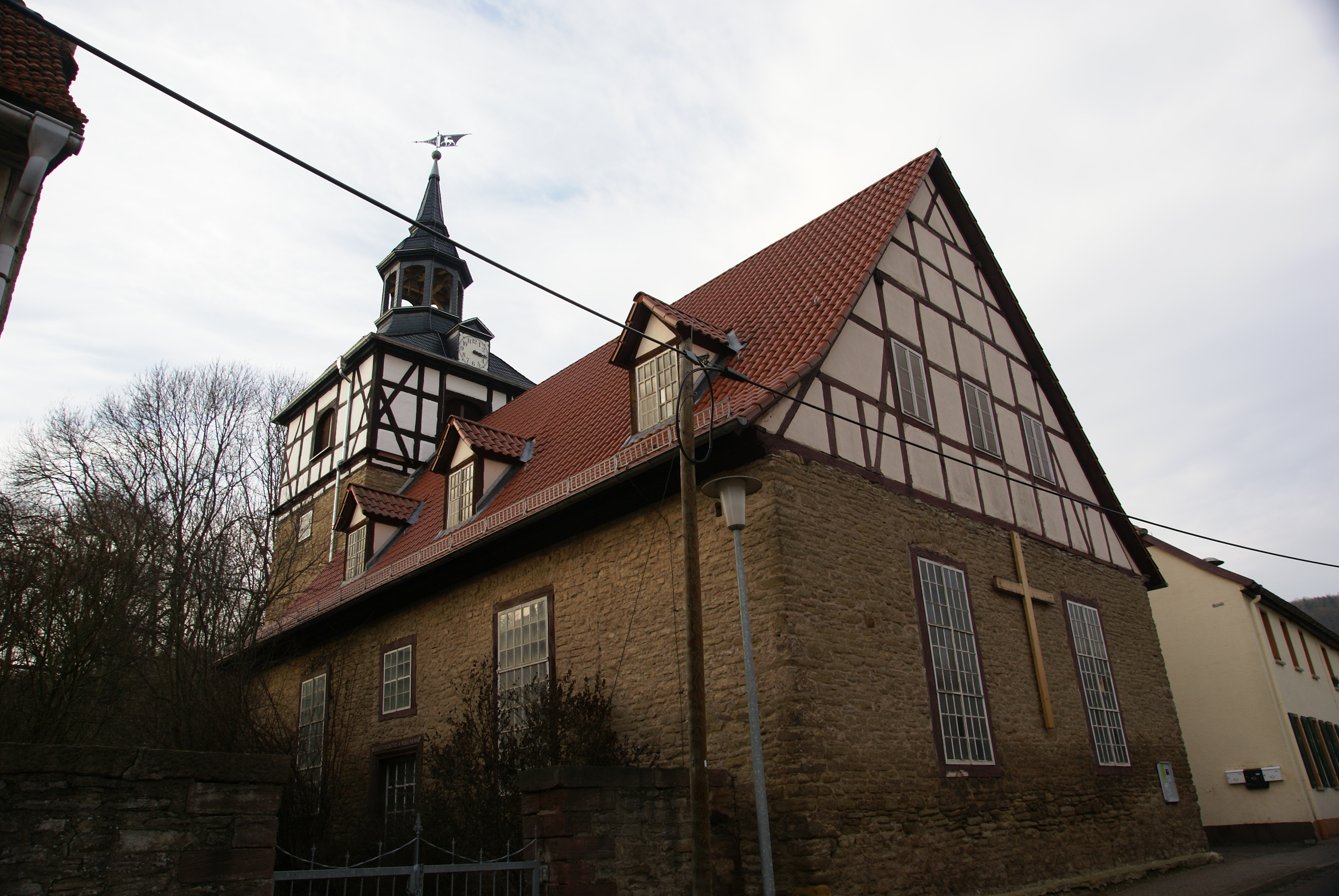 die Dorfkirche von Wickerode